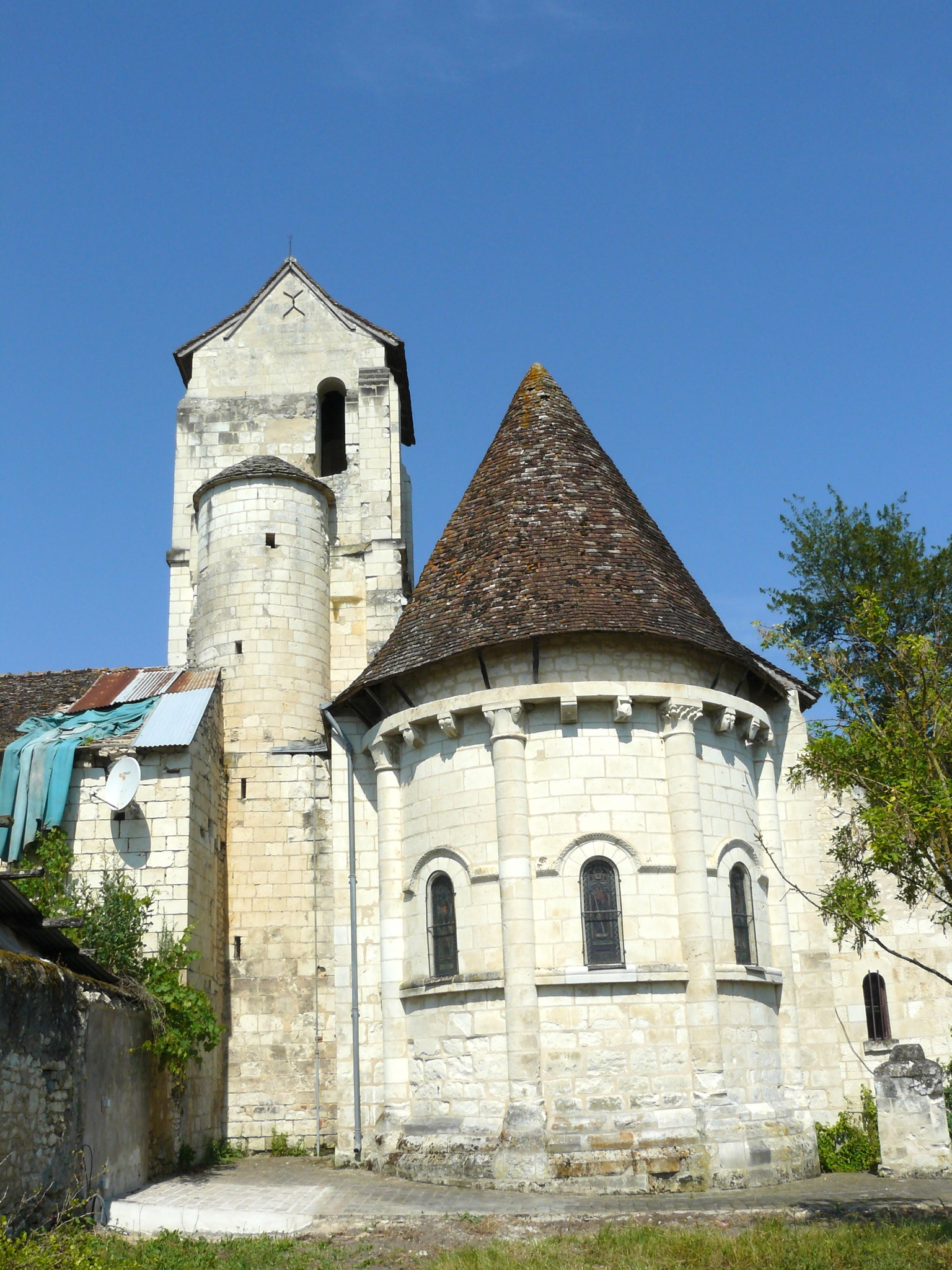 Église Saint-Médard de Chaumussay .